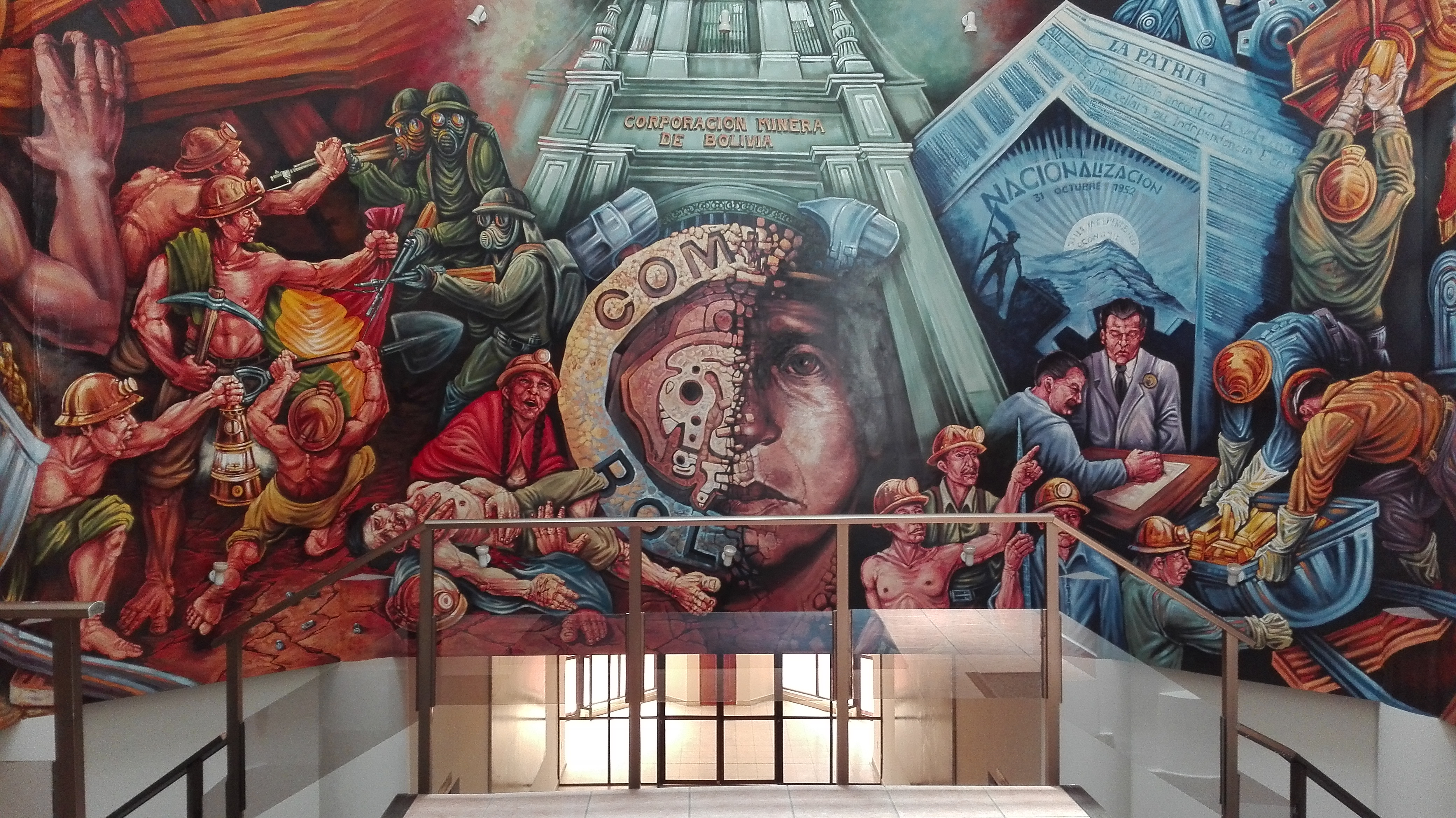 Mural ubicado dentro del archivo Histórico de la Corporación Minera de Bolivia.